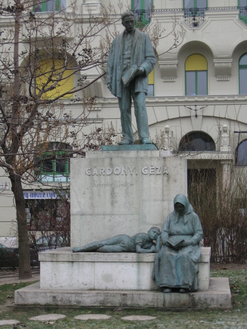 Gárdonyi Géza szobra (alkotó: Horvay János, anyaga: bronz, mészkő, állította: Országos Gárdonyi Géza Irodalmi Társaság, közadakozásból, 1933-ban) Budapest, XI. ker., Bartók Béla út - Bercsényi u. közötti kis téren